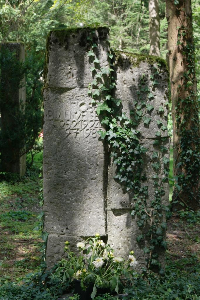 Grab des Grafikers, Designers, Illustrators und Karikaturisten Josef Blaumeiser, 1924-1988, auf dem Waldfriedhof München-Solln